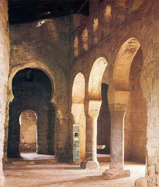 Date du cliché : septembre 2001.